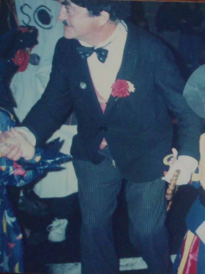 El Charlot de Las Palmas (Santiago García) durante la Gran Cabalgata del Carnaval de Las Palmas de Gran Canaria, Gran Canaria. Islas Canarias (España).